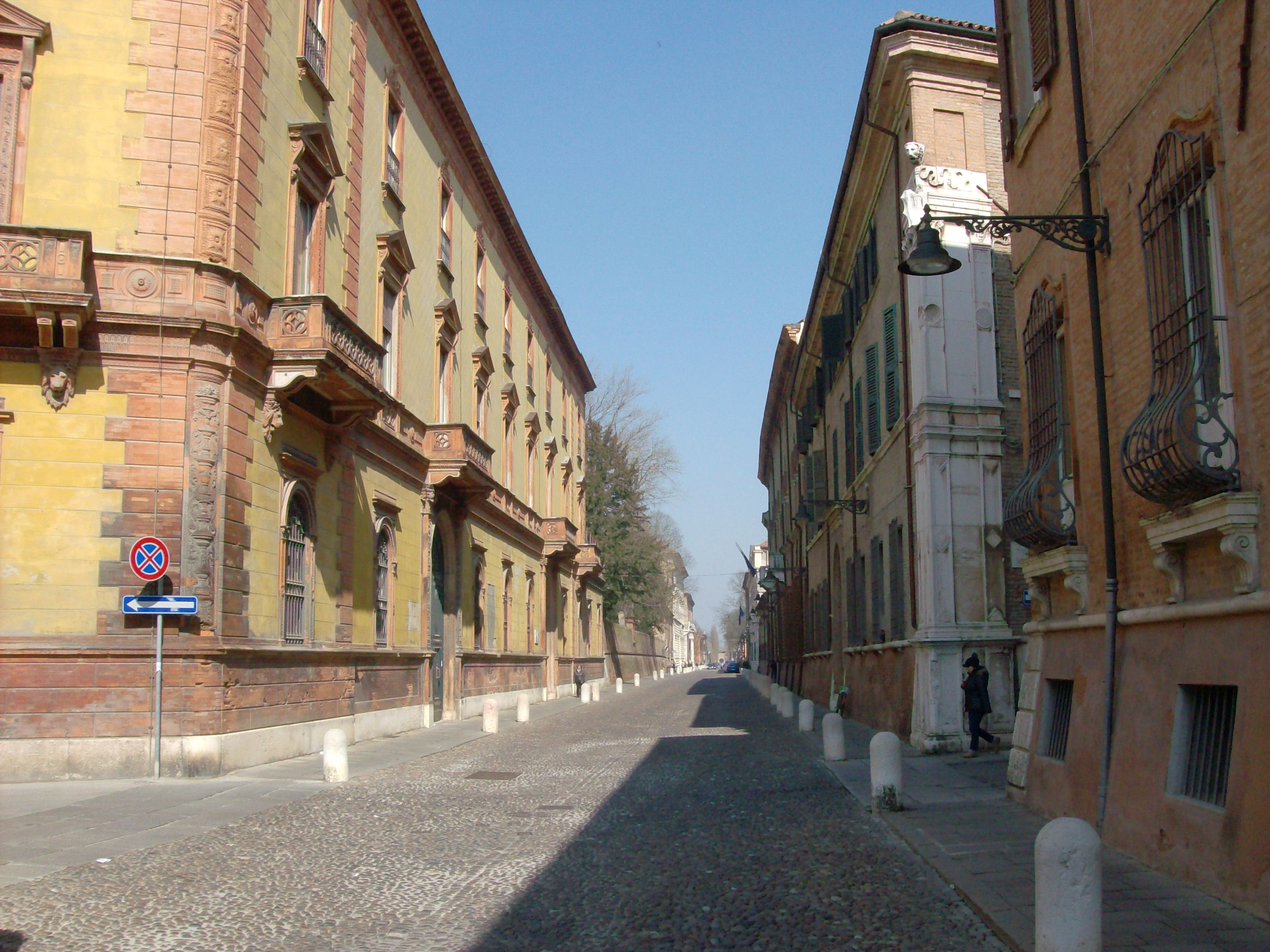 Corso Ercole I d'Este